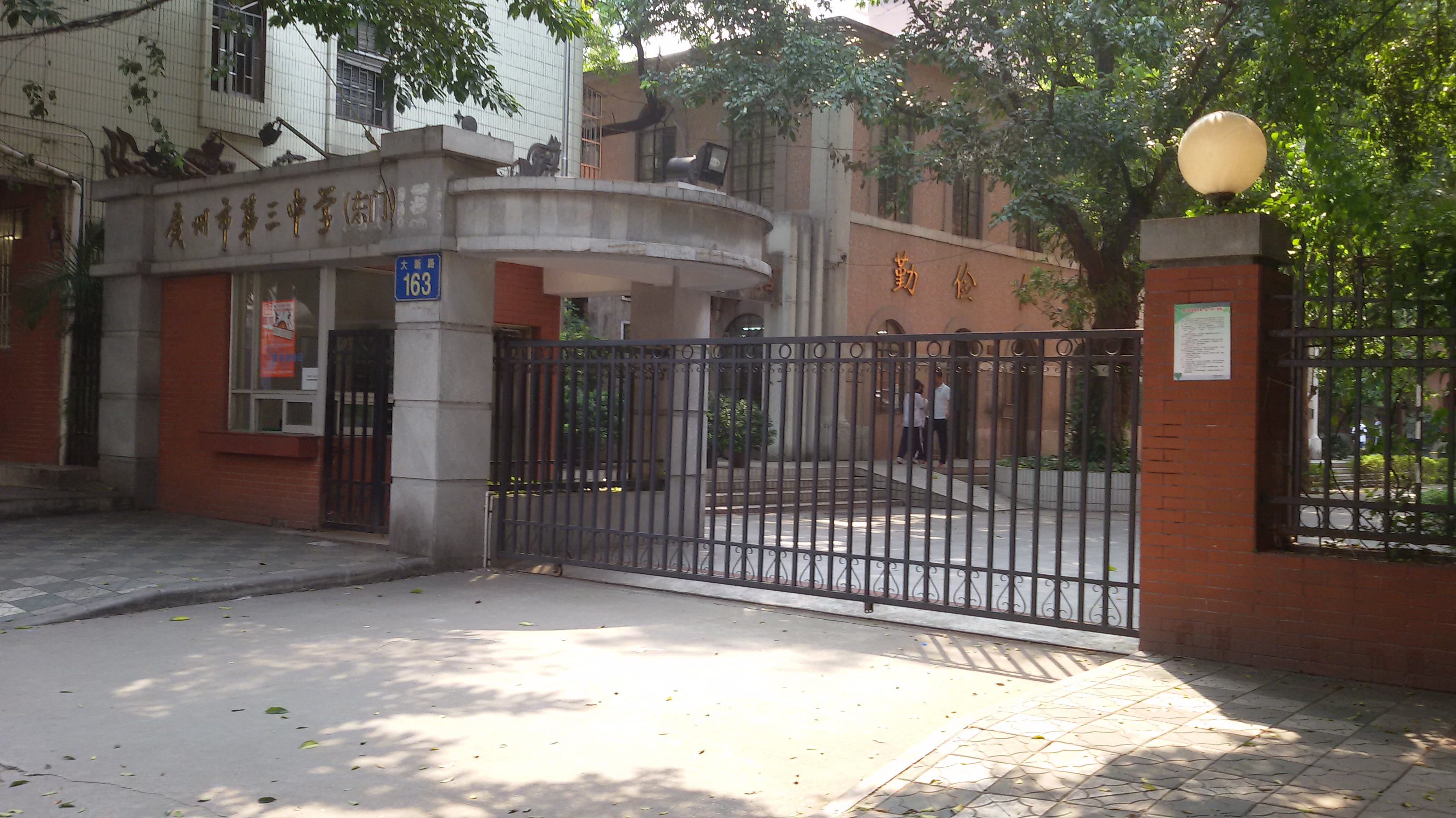 粵語: 廣州市第三中學嘅東門，電影《我的影子在奔跑》就喺呢棟門口附近拍過。